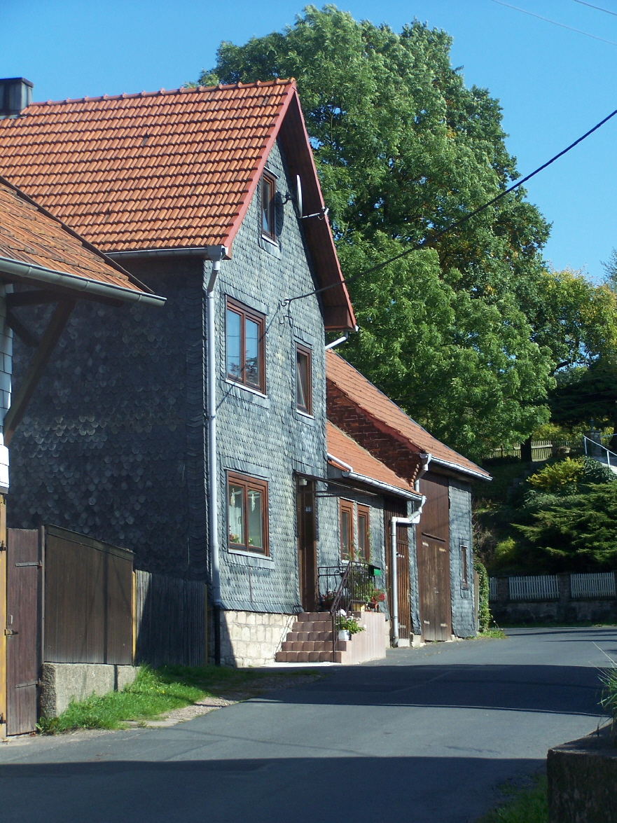 Als Schutz vor Regen ist die Mehrzahl der Fachwerkhäuser mit einem Witterungschutz aus Schiefer versehen. Die ortsbildbestimmende Fassadengestaltung wird jedoch auch in Mosbach immer seltener.